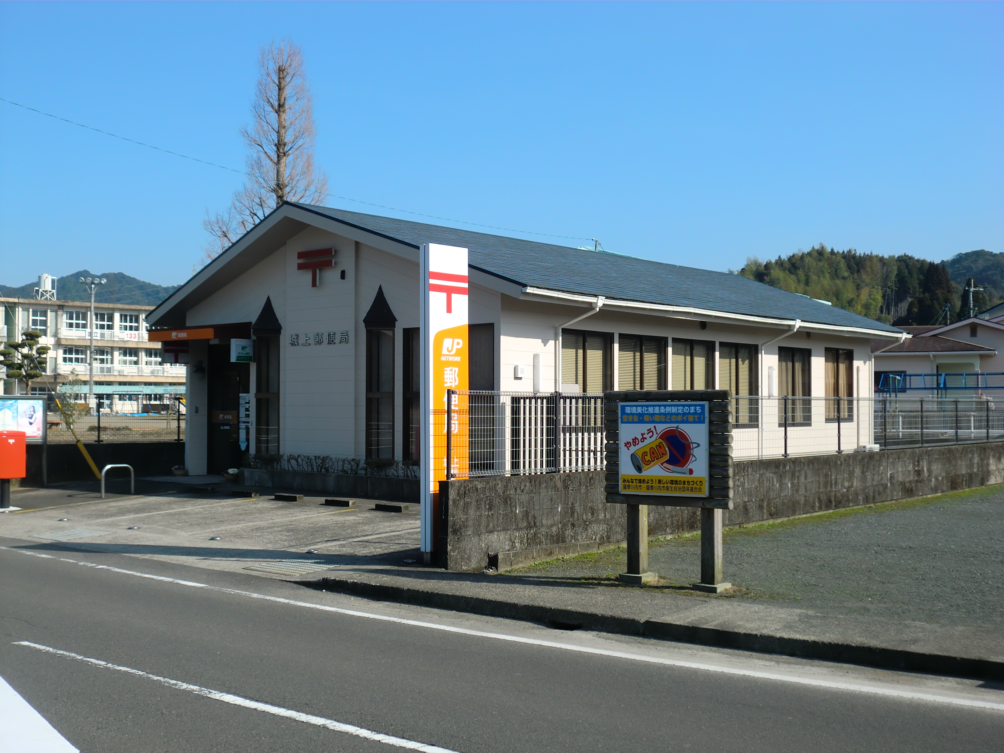 薩摩川内市にある城上（じょうかみ）郵便局